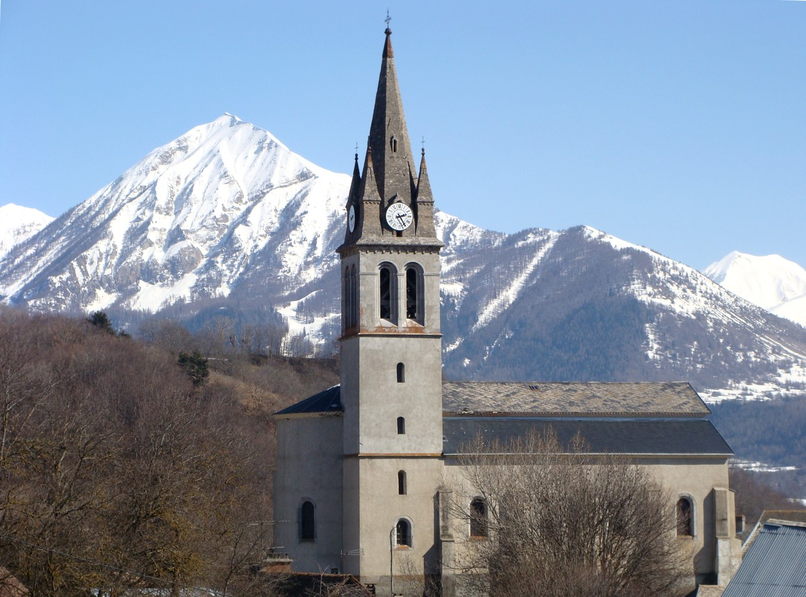 L'église de Saint-Julien-en-Champsaur vue de l'ouest. A l'arrière-plan, la Petite Autane et le haut des pistes de ski de Saint-Léger.